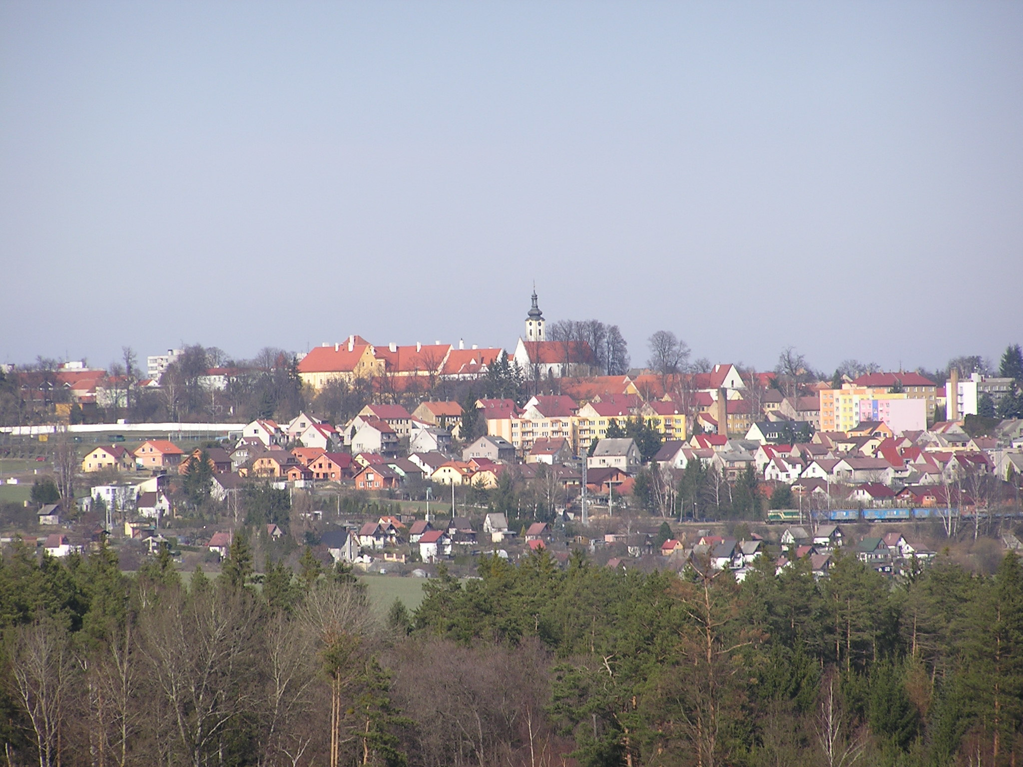 Borovany z dálky